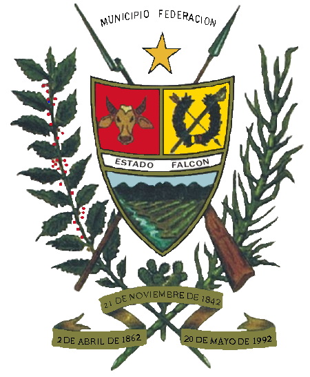 Escudo del municipio Federación, estado Falcón, Venezuela